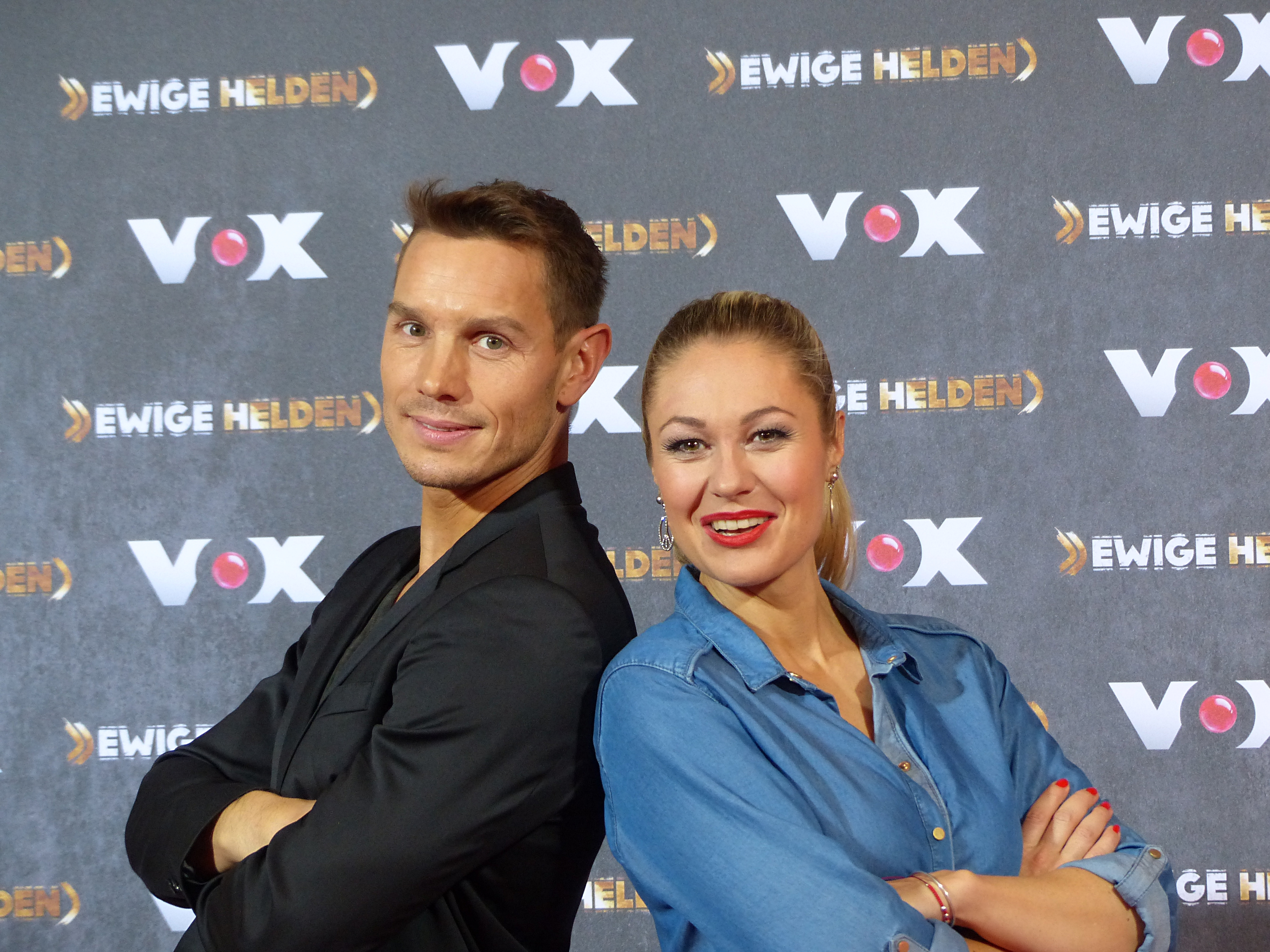 Dr. Daniel Gärtner und Ruth Moschner beim VOX "Ewige Helden" Pressetermin, im Dezember 2015.